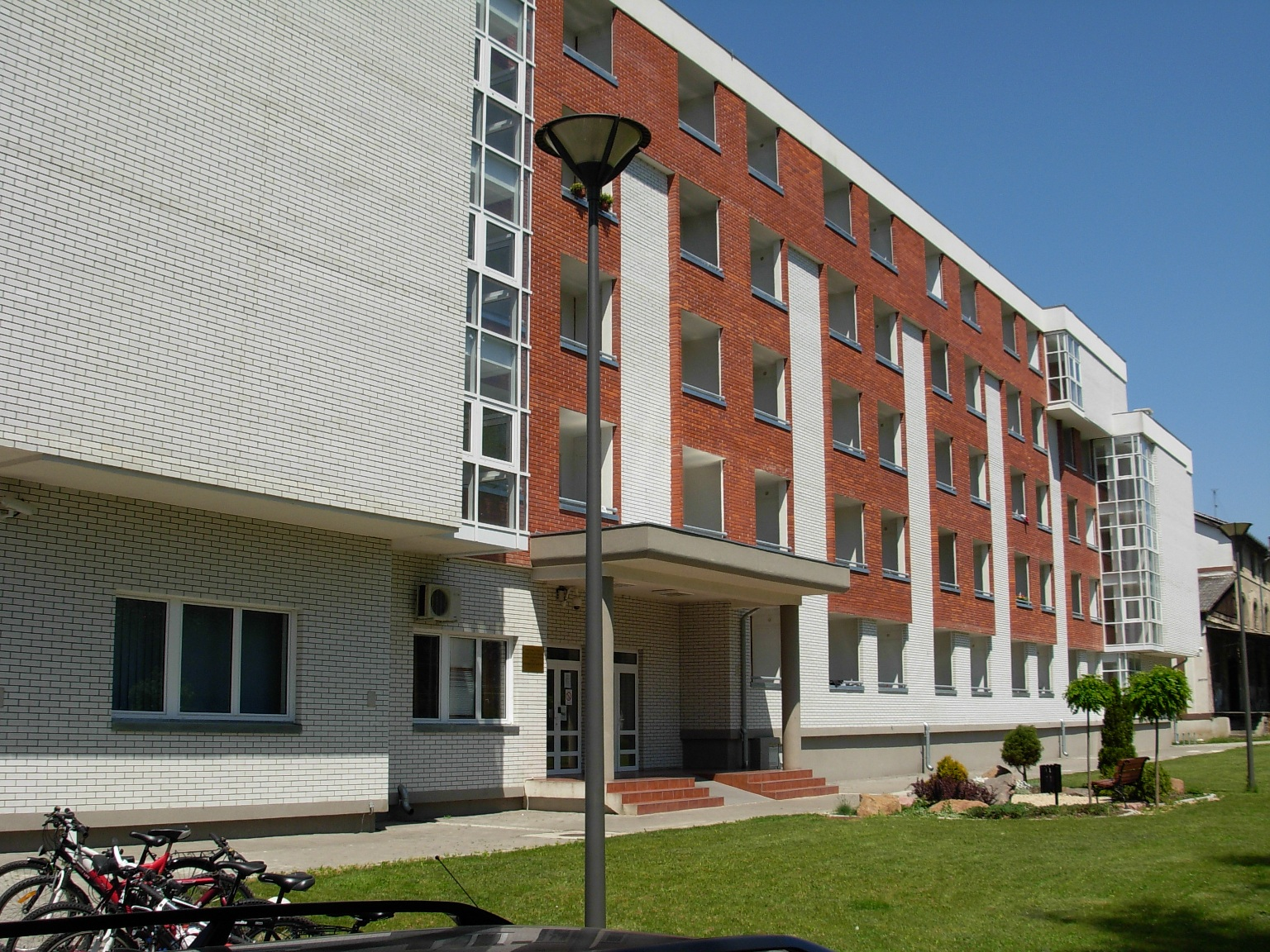 Studentski dom C u Novom Sadu.